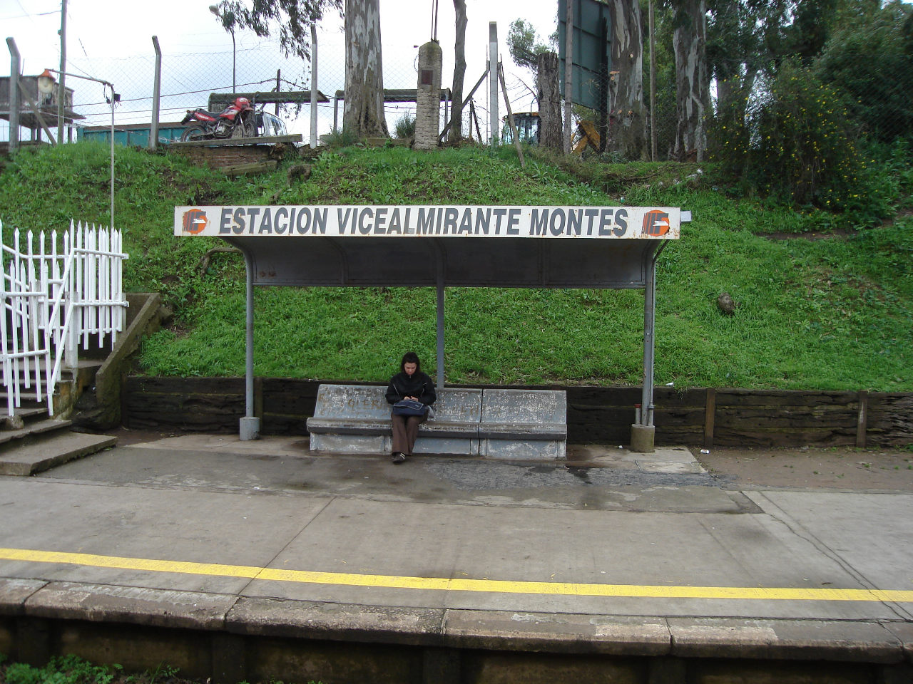 Refugio en la estación Vicealmirante Montes del Ferrocarril General Belgrano. Don Torcuato, partido de Tigre, provincia de Buenos Aires, República Argentina.